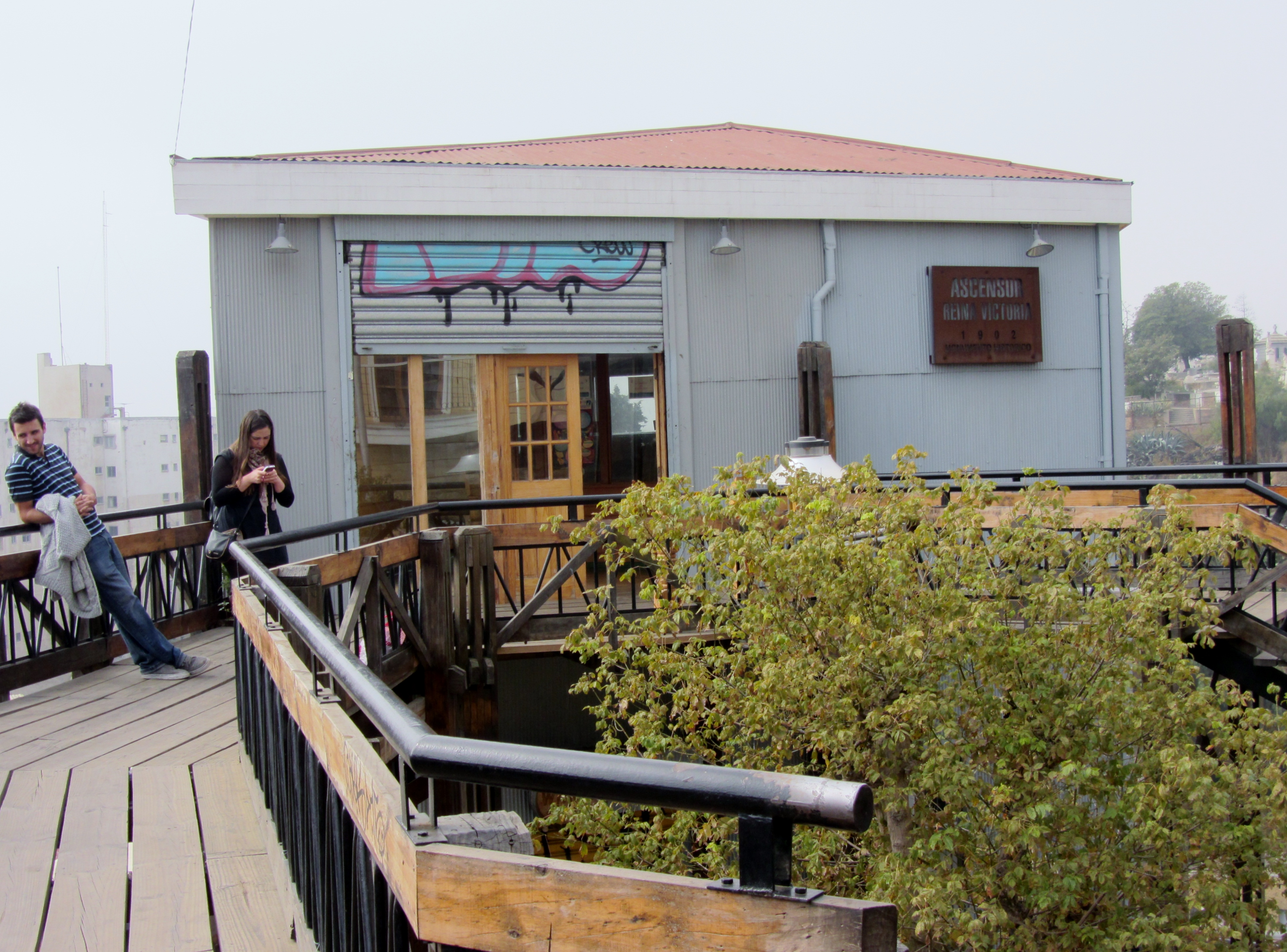 Acceso a la estación alta del ascensor Reina Victoria, Template:Valparaíso